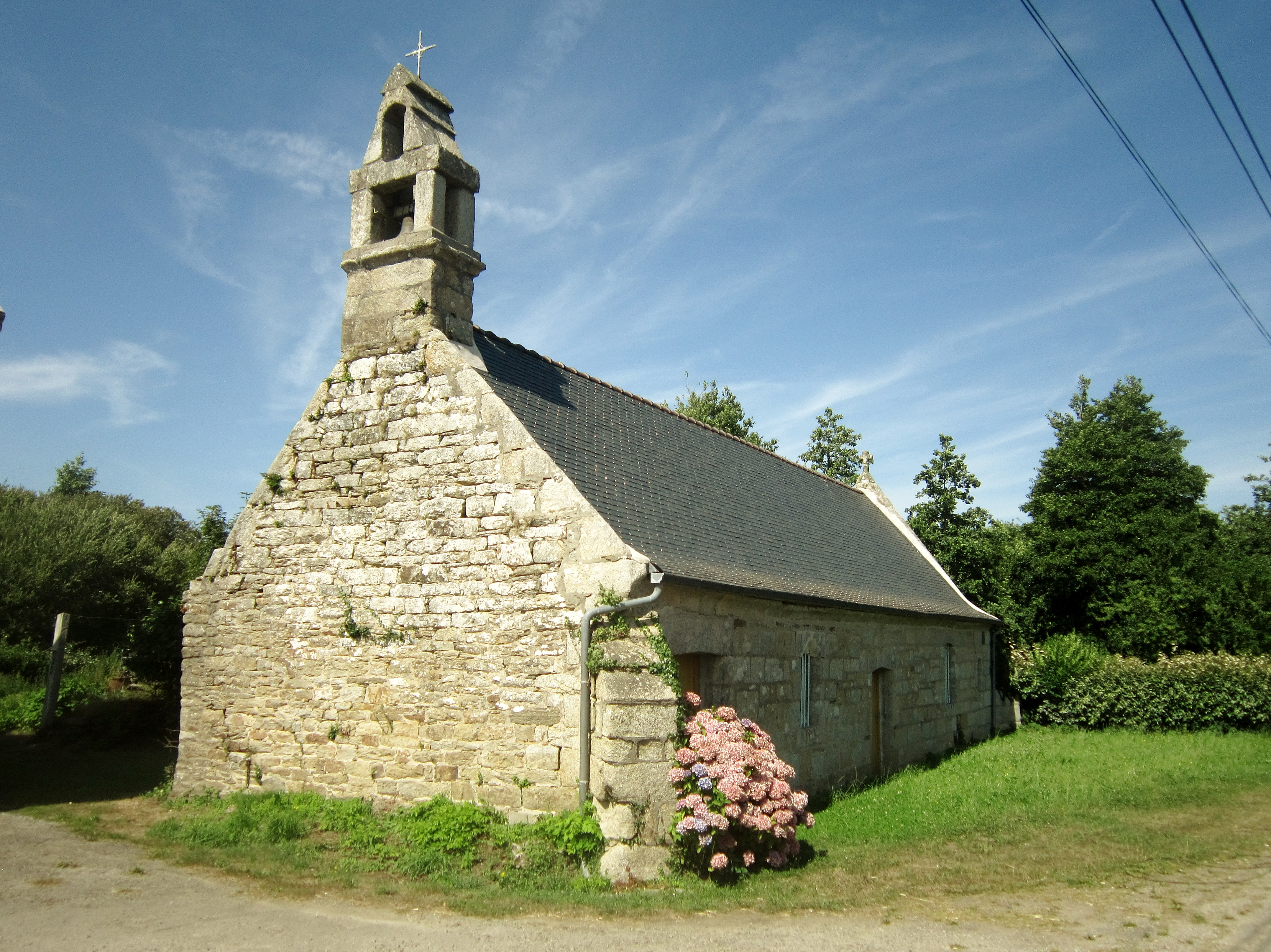 Plougonvelin : la chapelle Saint-Jean.